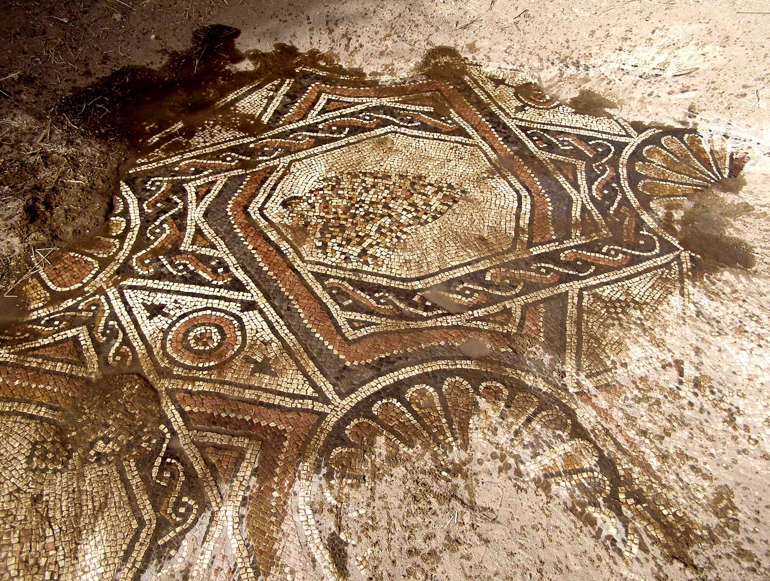 Mozaik in Hurva Hanot, Israel